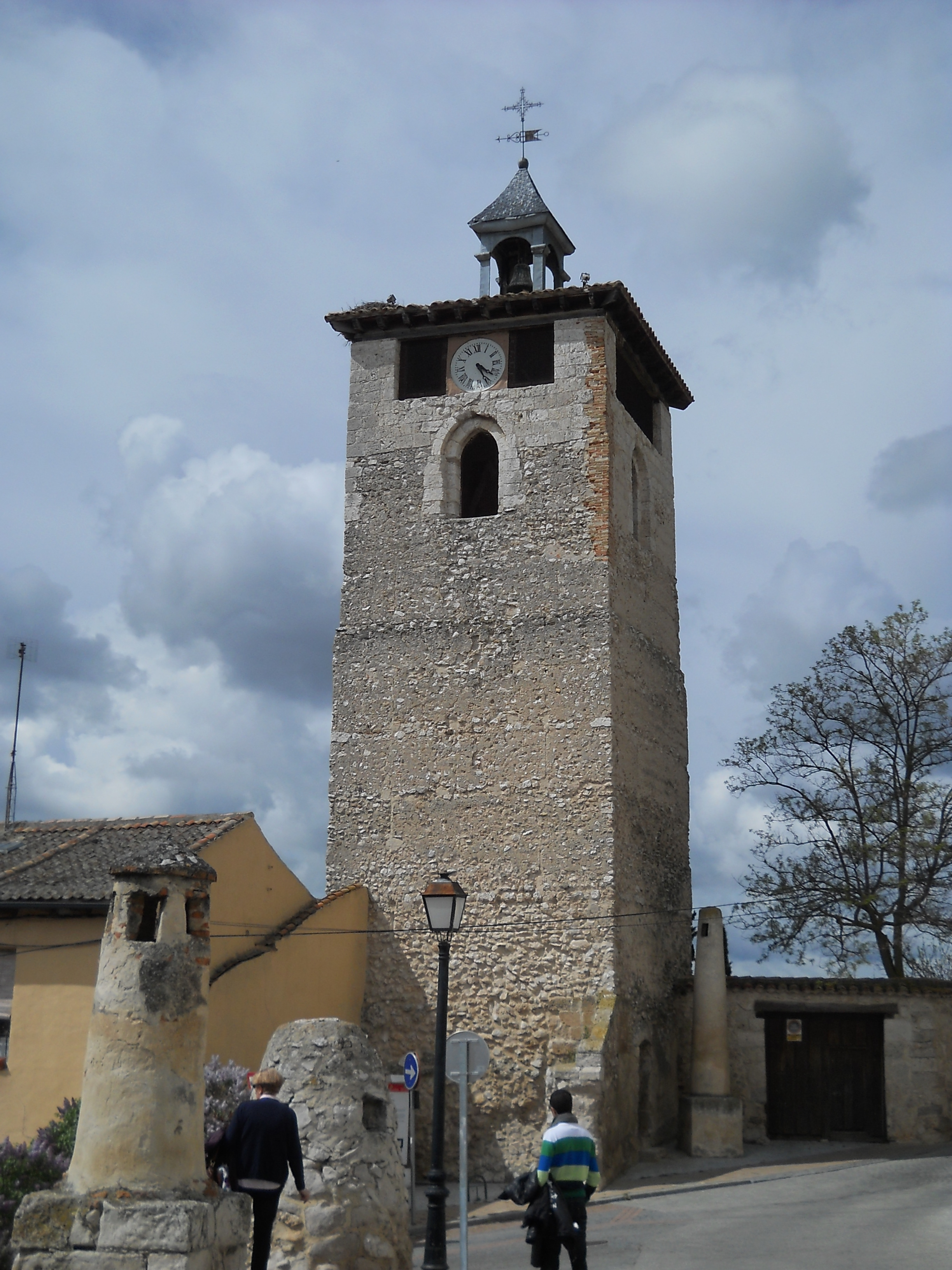 Torre dell'orologio, Peñafiel, Valladolid, Spagna